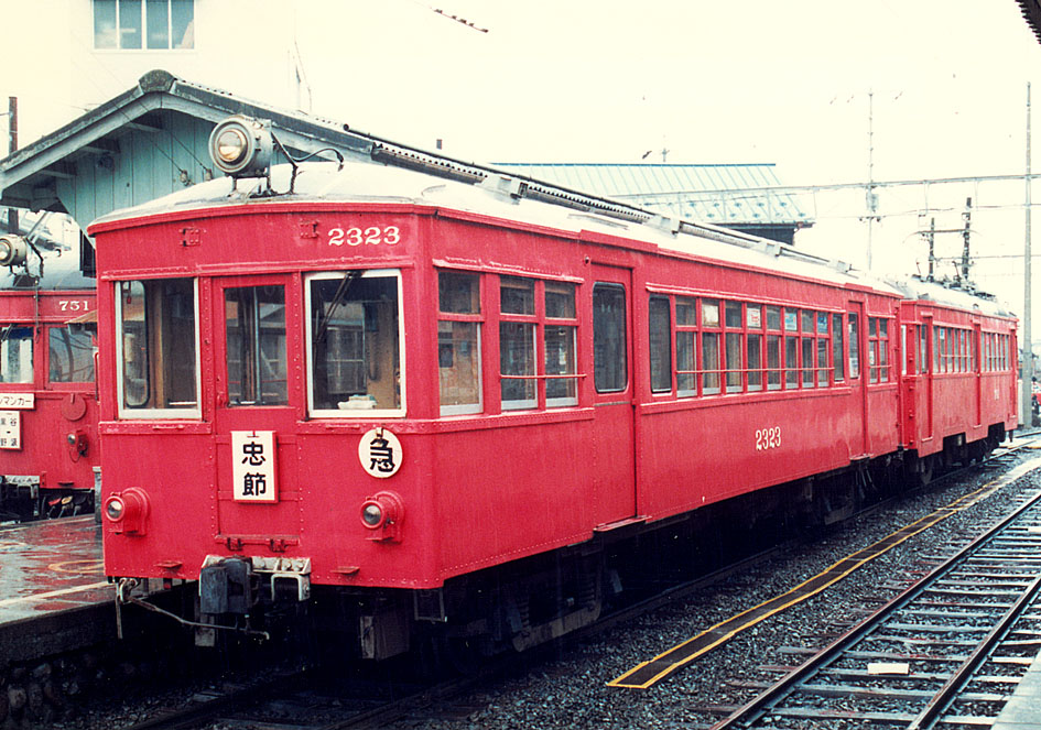 名古屋鉄道 2323